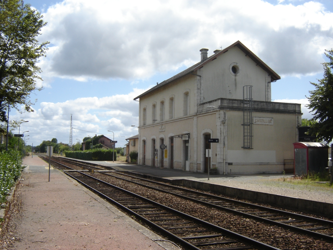 Gare de Castillon-la-Bataille, Gironde, France